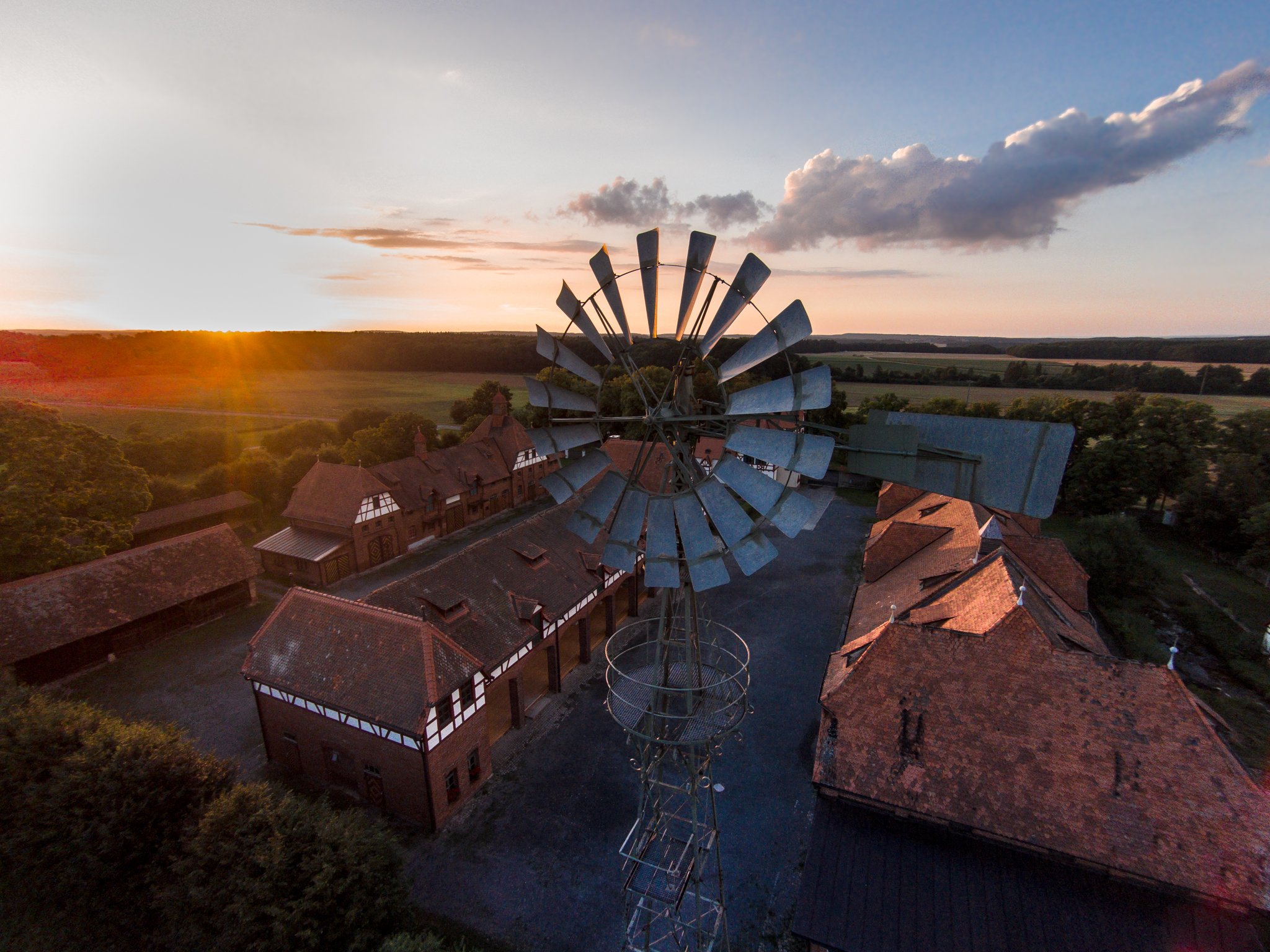 Wolfgangshof, Anwanden, im AbendlichtThis is a photograph of an architectural monument.